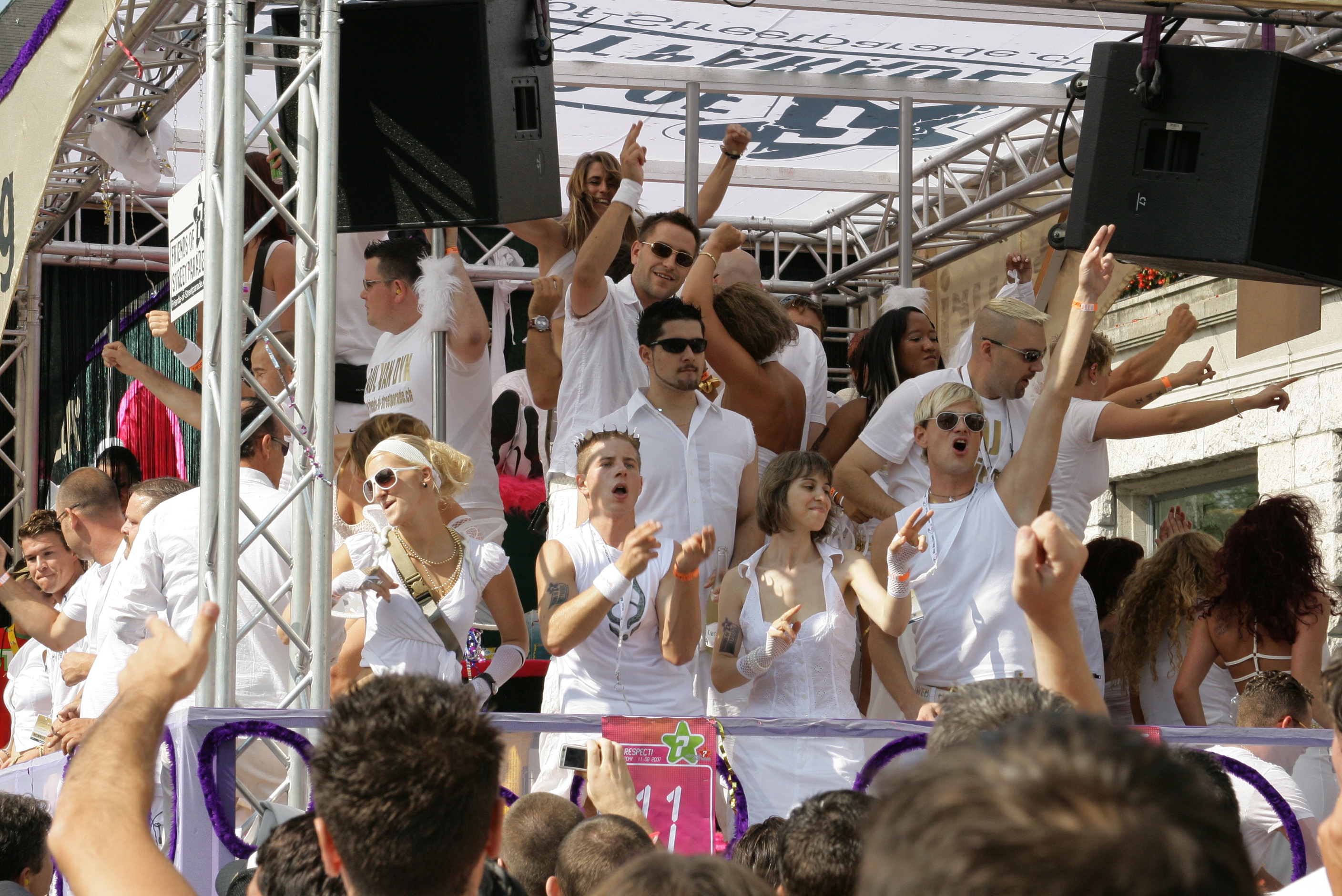 Zürich Street Parade 2007.